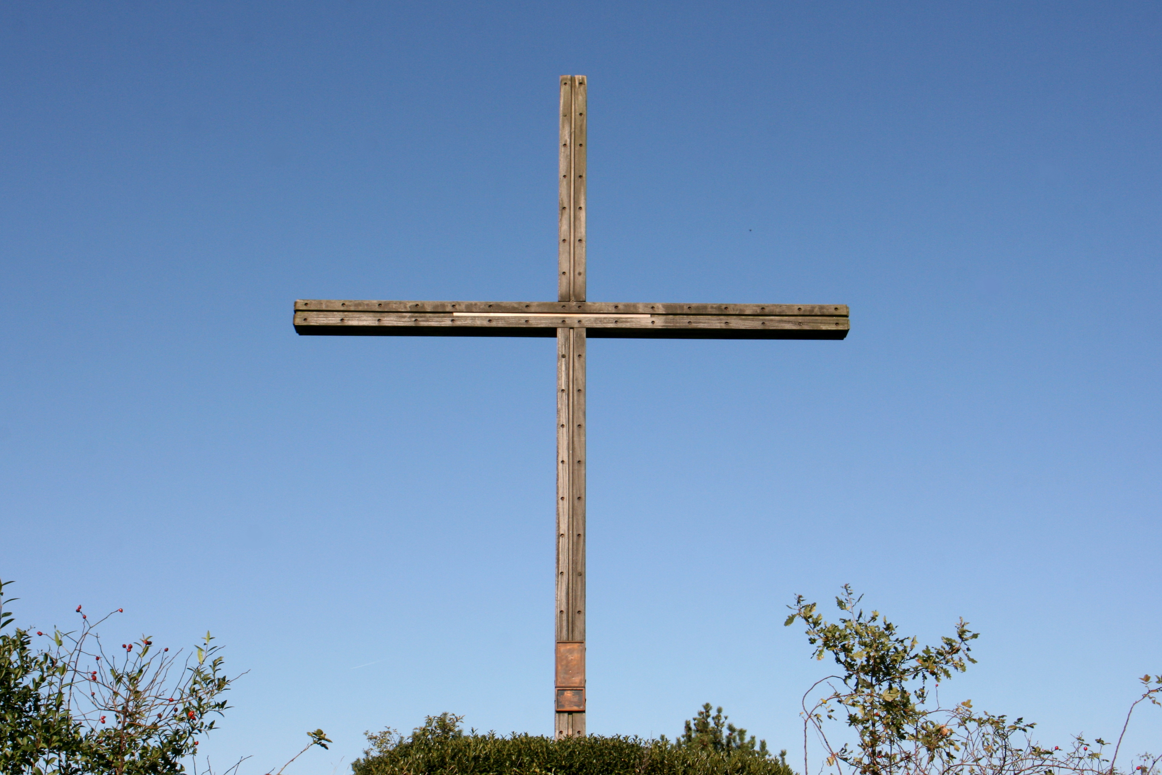 Kreuzweg, Station 12, auf Halde Haniel in Bottrop